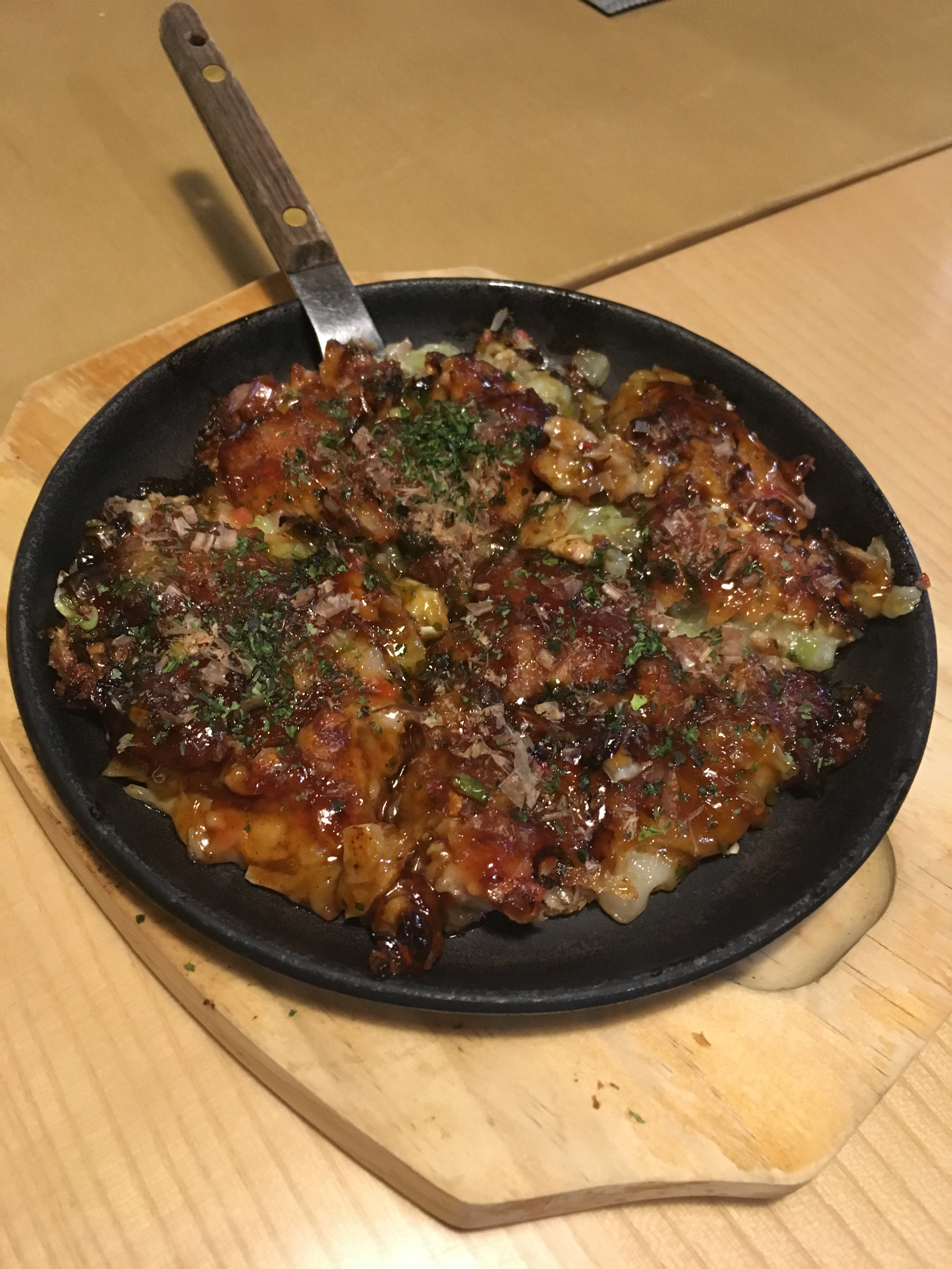 洋食の中でも、大阪府岸和田市特有の「かしみん焼き」